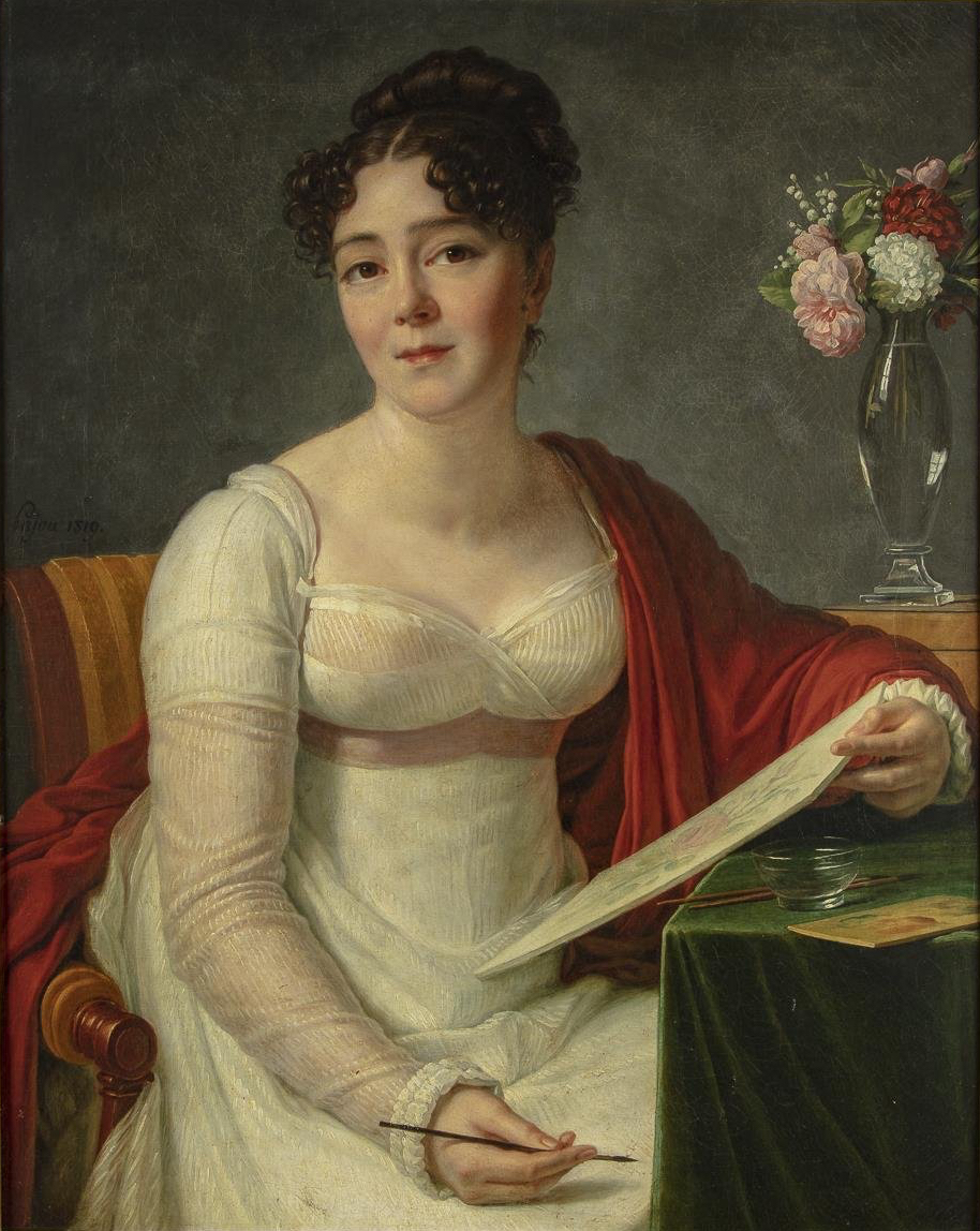 Portrait présumé d'Anne-Ernestine Panckoucke (1784-1860), née Désormeaux